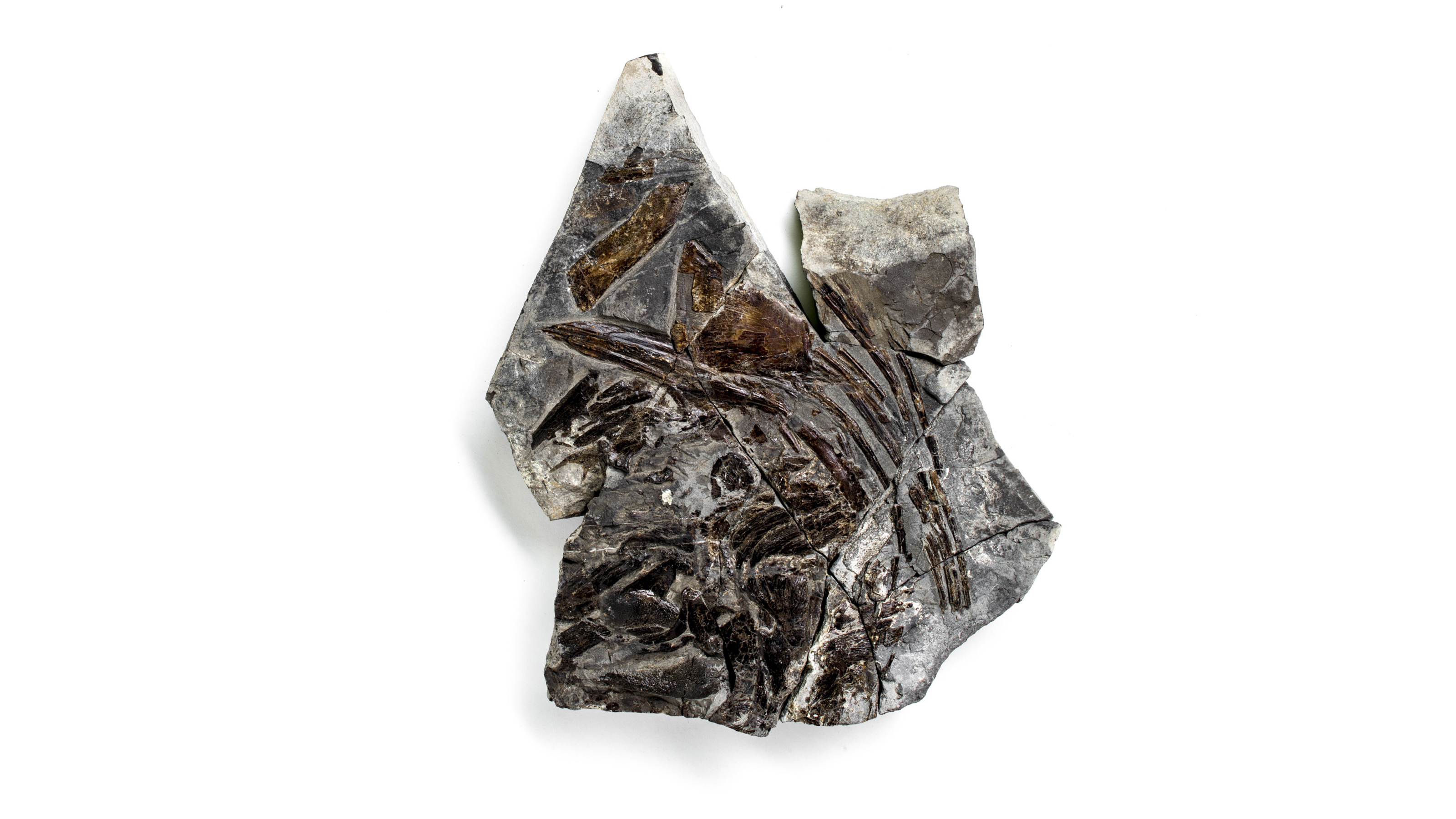 Tselfatia